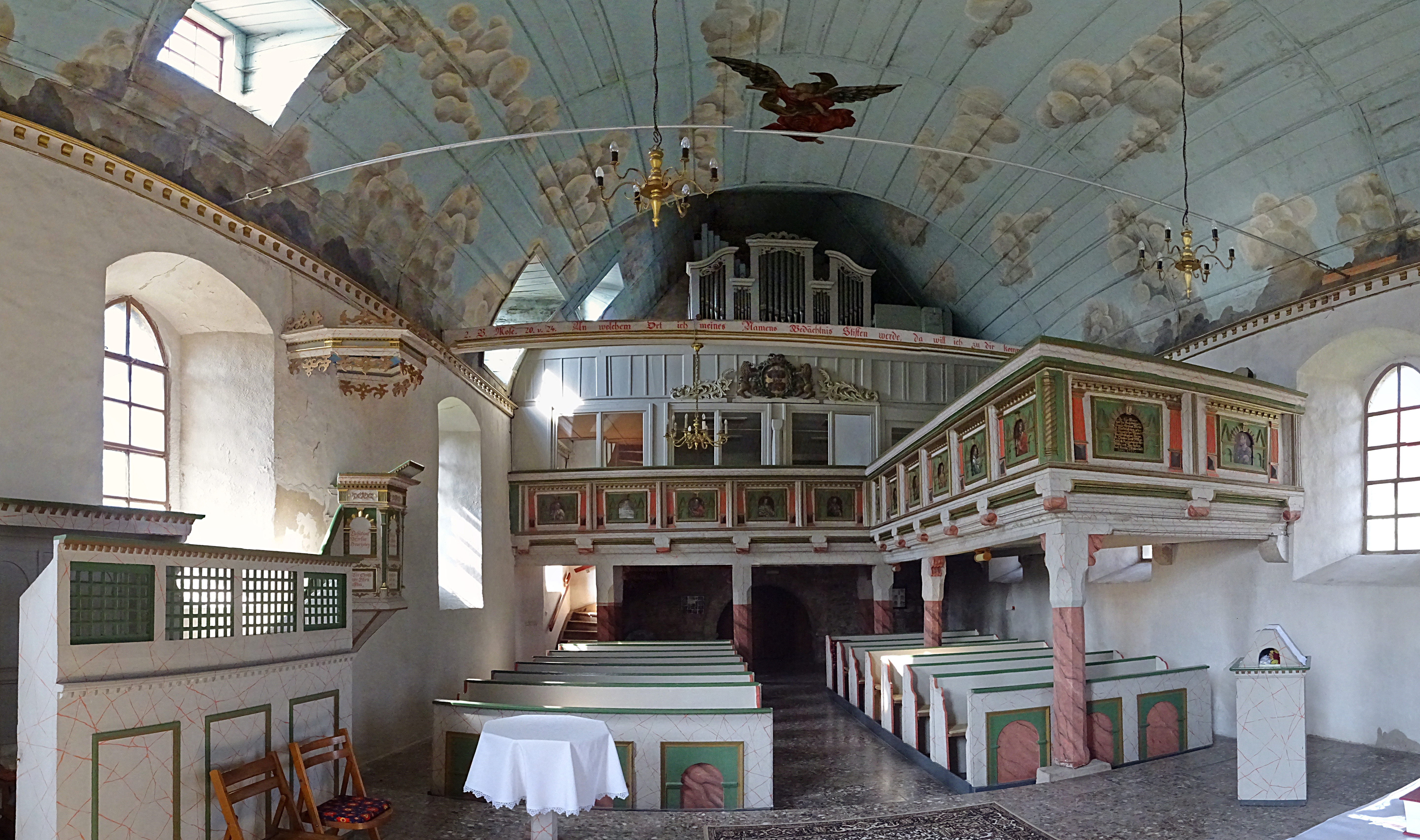 Innenraum Panorama in der Dorfkirche St. Albani Pustleben